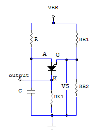 Ejemplo de conexion para el PUT